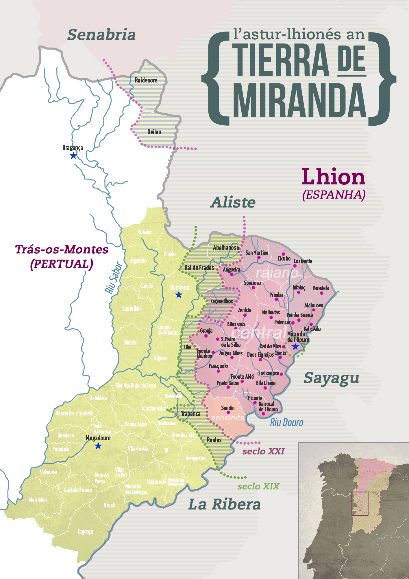 Distribución del asturllionés en Tierra de Miranda